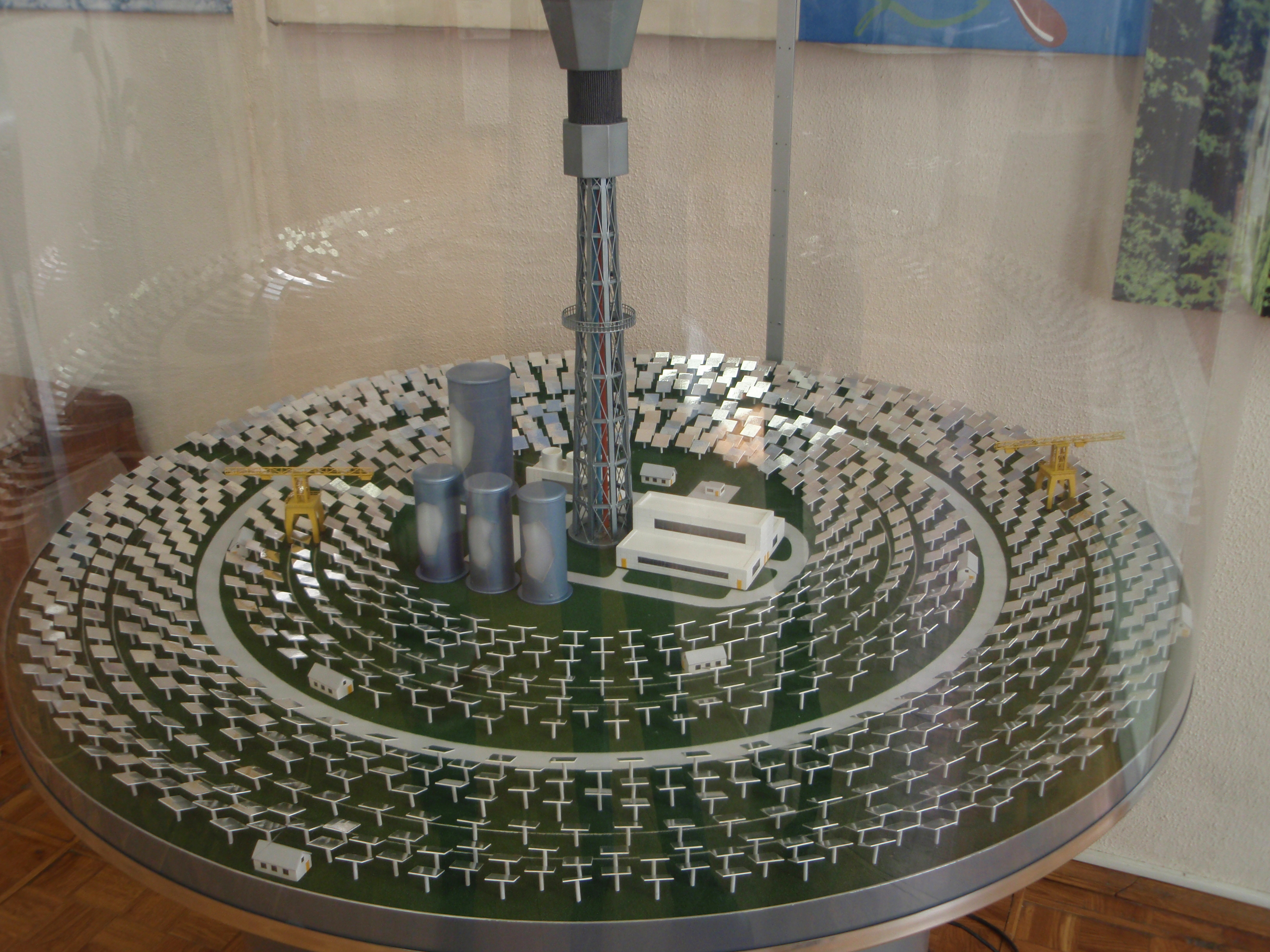 Модель солнечной электростанции, Государственный Политехнический музей (г.Москва)